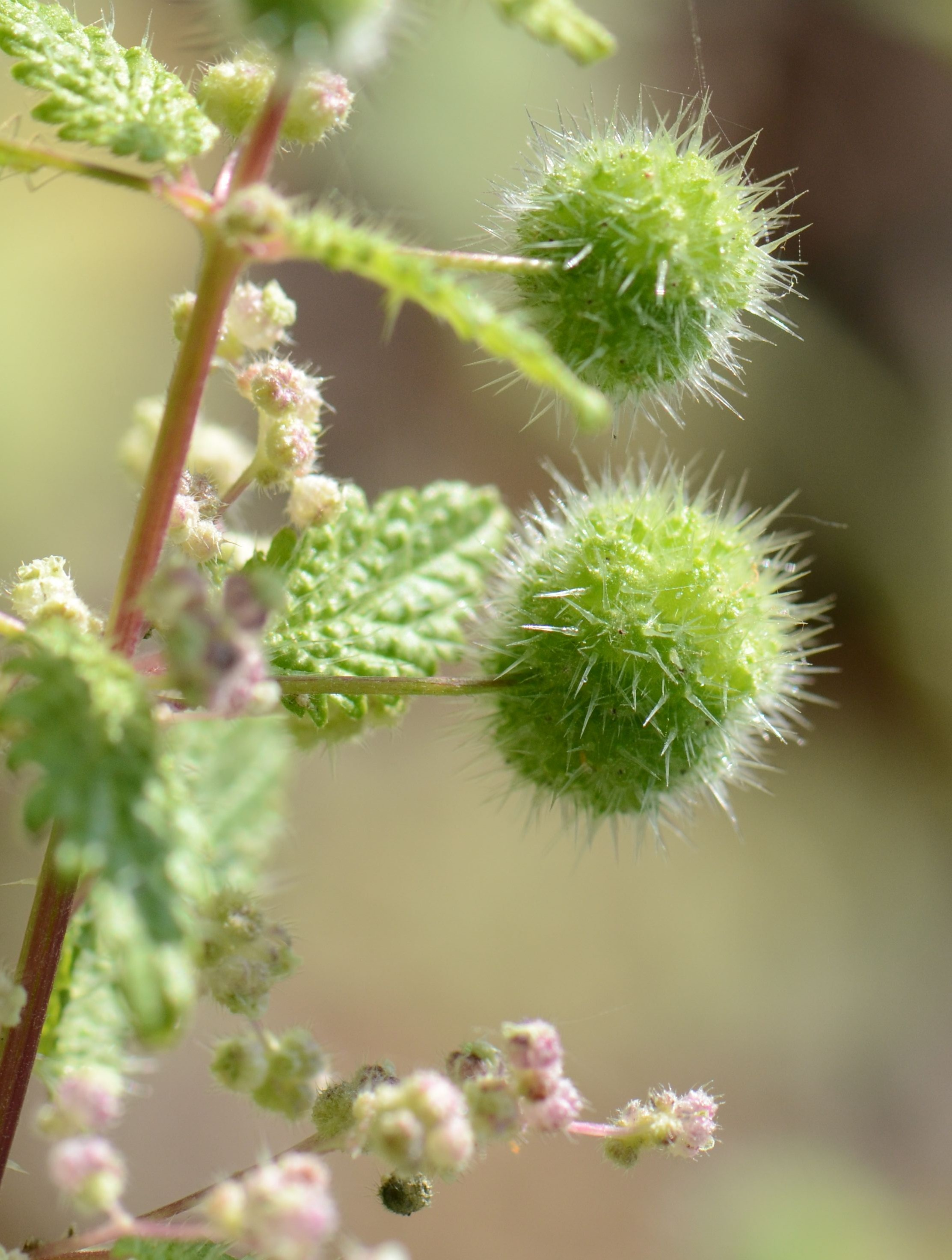 Urtica pilulifera, glomérules de fleurs femelles et grappes de fleurs mâles